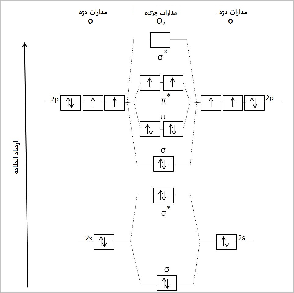 مخطط المدارات الجزيئية لجزيء الأكسجين